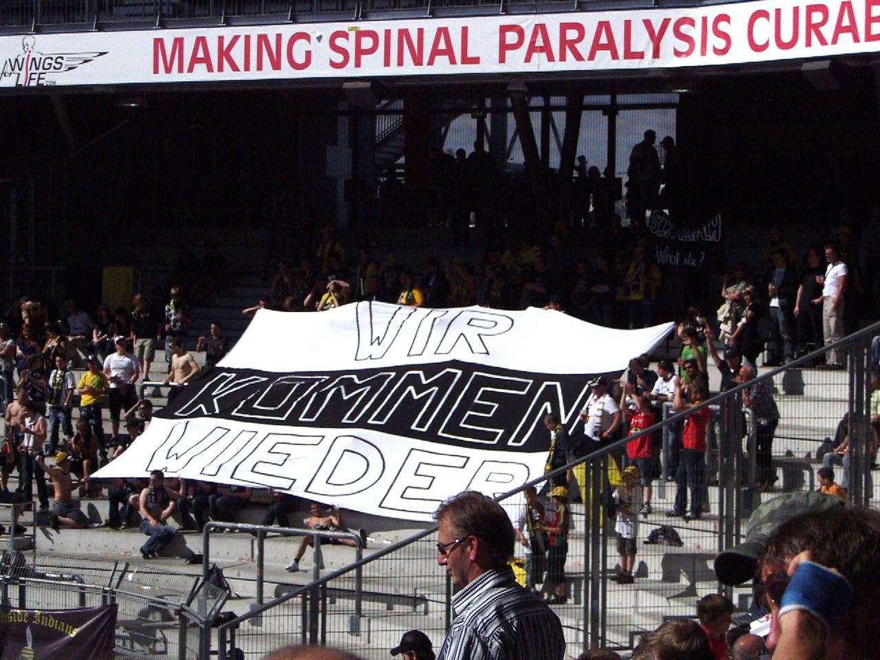 Fans des SC Rheindorf Altach geben ihre Meinung zum Altach-Abschied aus der österreichischen Bundesliga kund